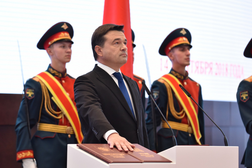 Андрей Воробьев вступил в должность губернатора Московской области